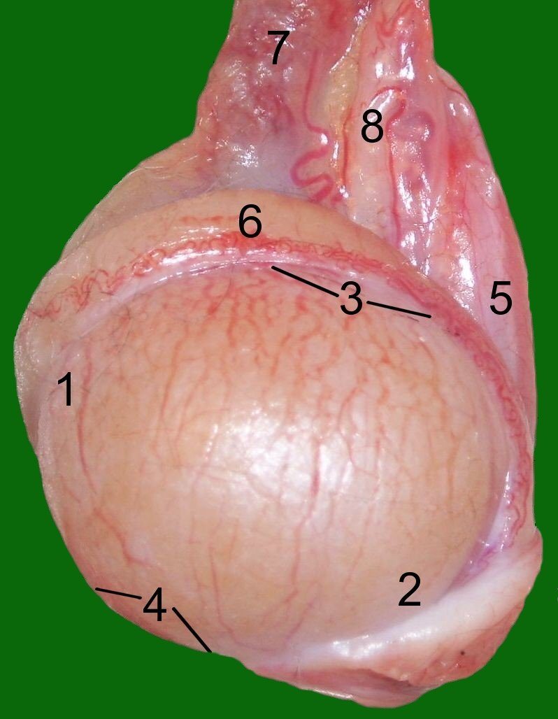 Testicle of a cat: 1 Extremitas capitata, 2 Extremitas caudata, 3 Margo epididymalis, 4 Margo liber, 5 Mesorchium, 6 Epididymis, 7 Arteria and Vena testicularis, 8 Ductus deferens